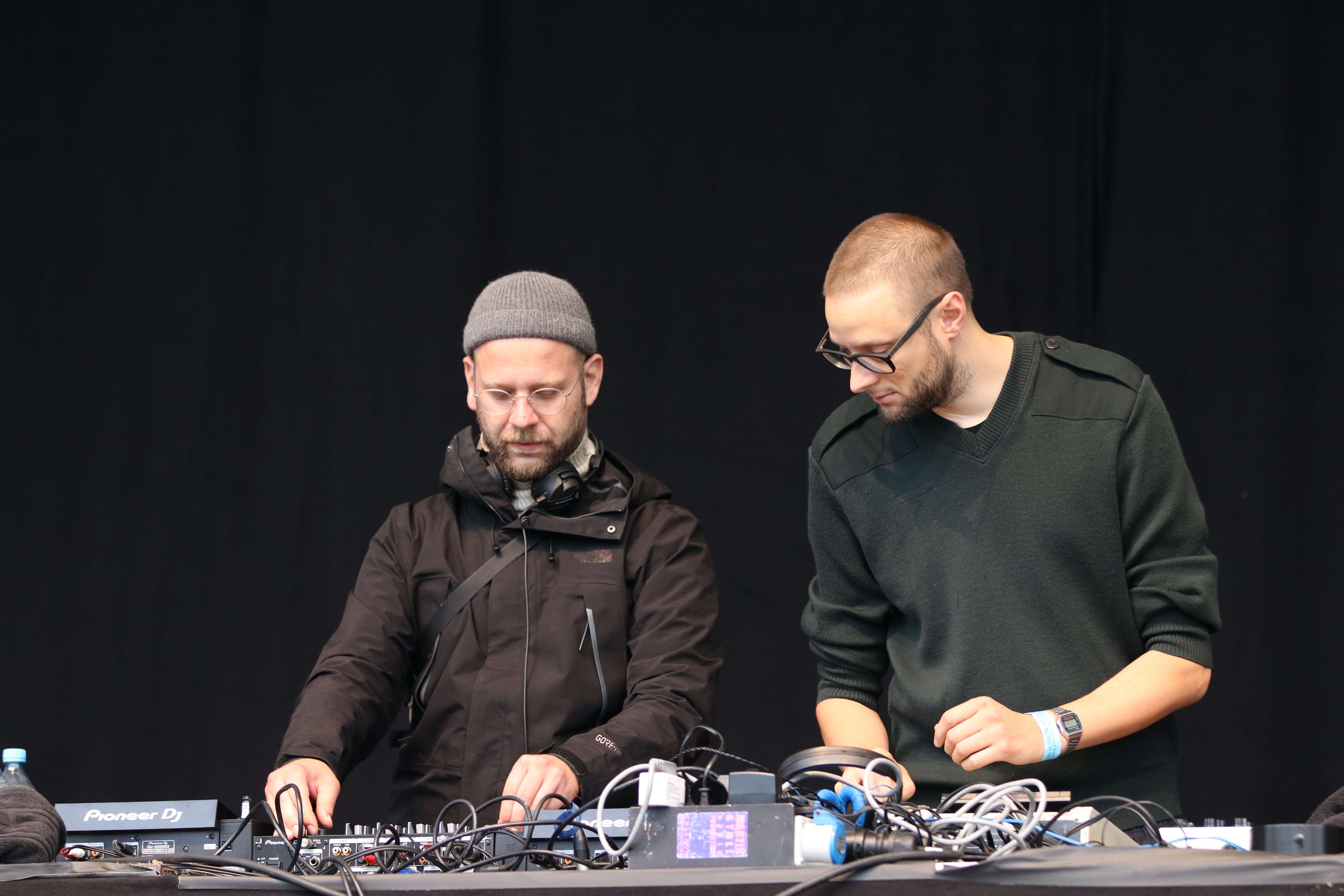 Ausgehetzt, Demonstration in München am 22. Juli 2018 gegen den Rechtsruck in der bayerischen Politik